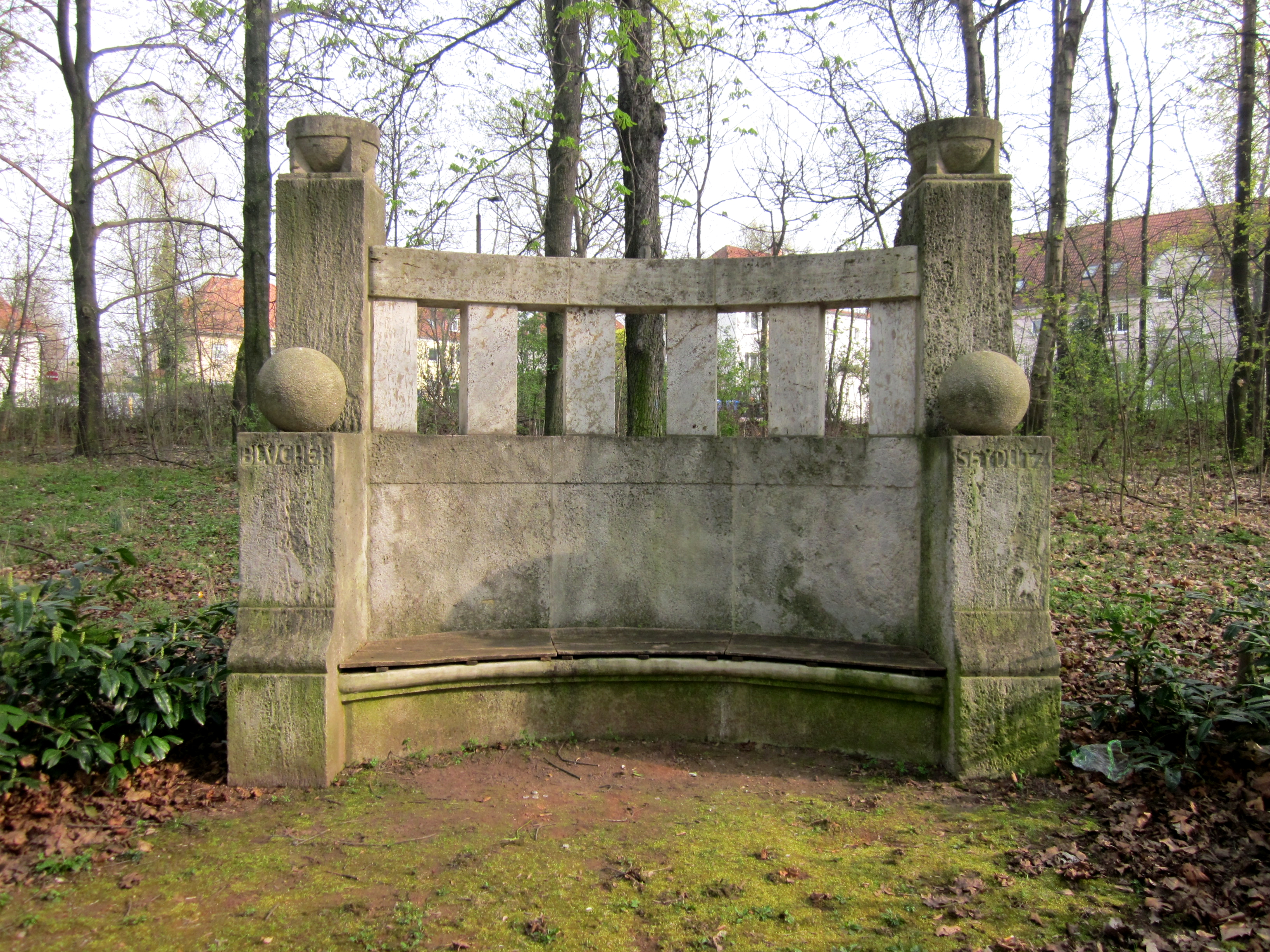 Feldherrenbank im Klemmbergpark in Weißenfels, zur Erinnerung an Friedrich Wilhelm von Seydlitz und Gerhard Leberecht von Blücher, Entwurf stammt von Paul Juckoff, aufgestellt einige Jahre vor dem Ersten Weltkrieg